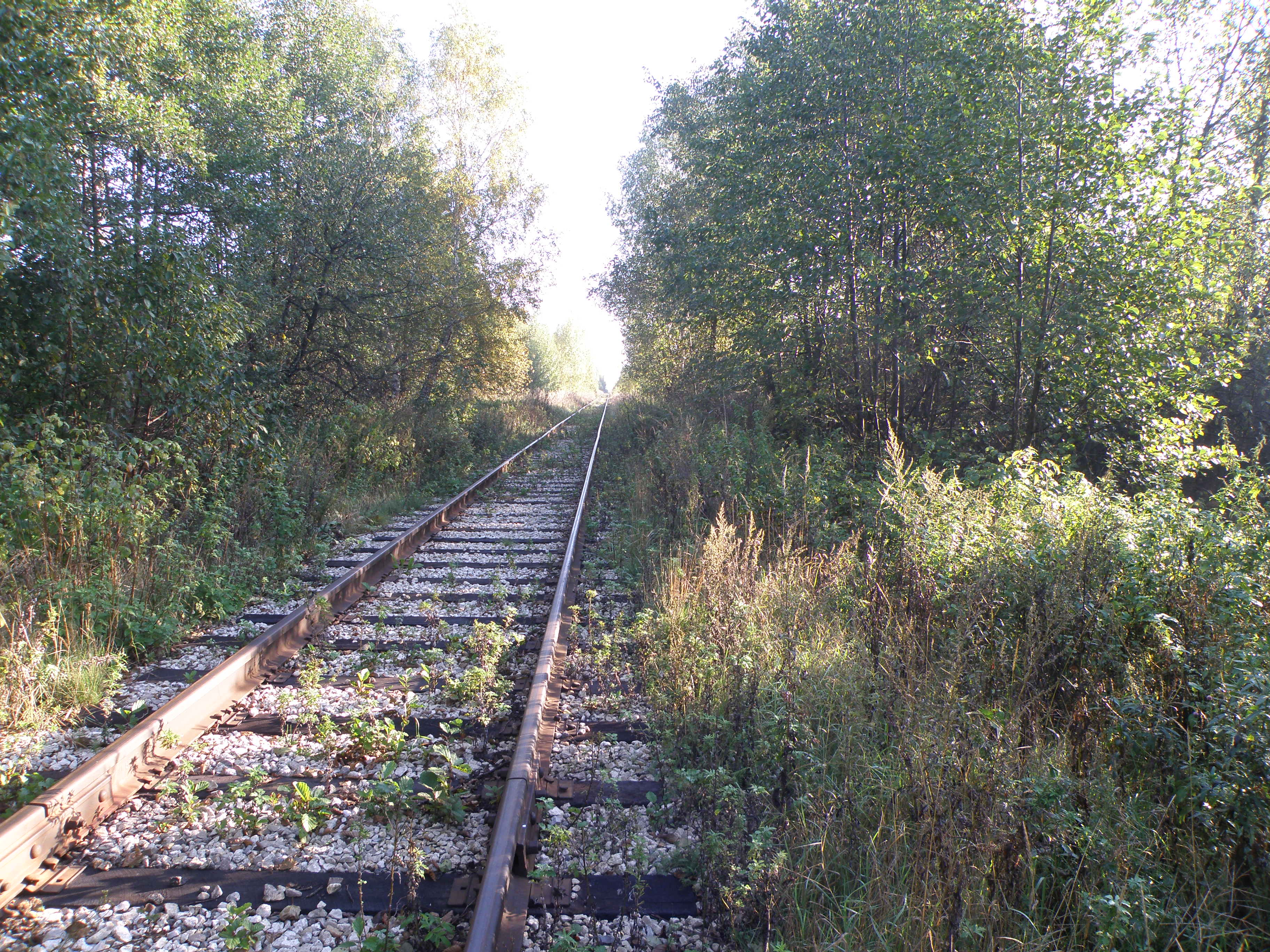 Уршельская ж. д. близ Тасинского Бора